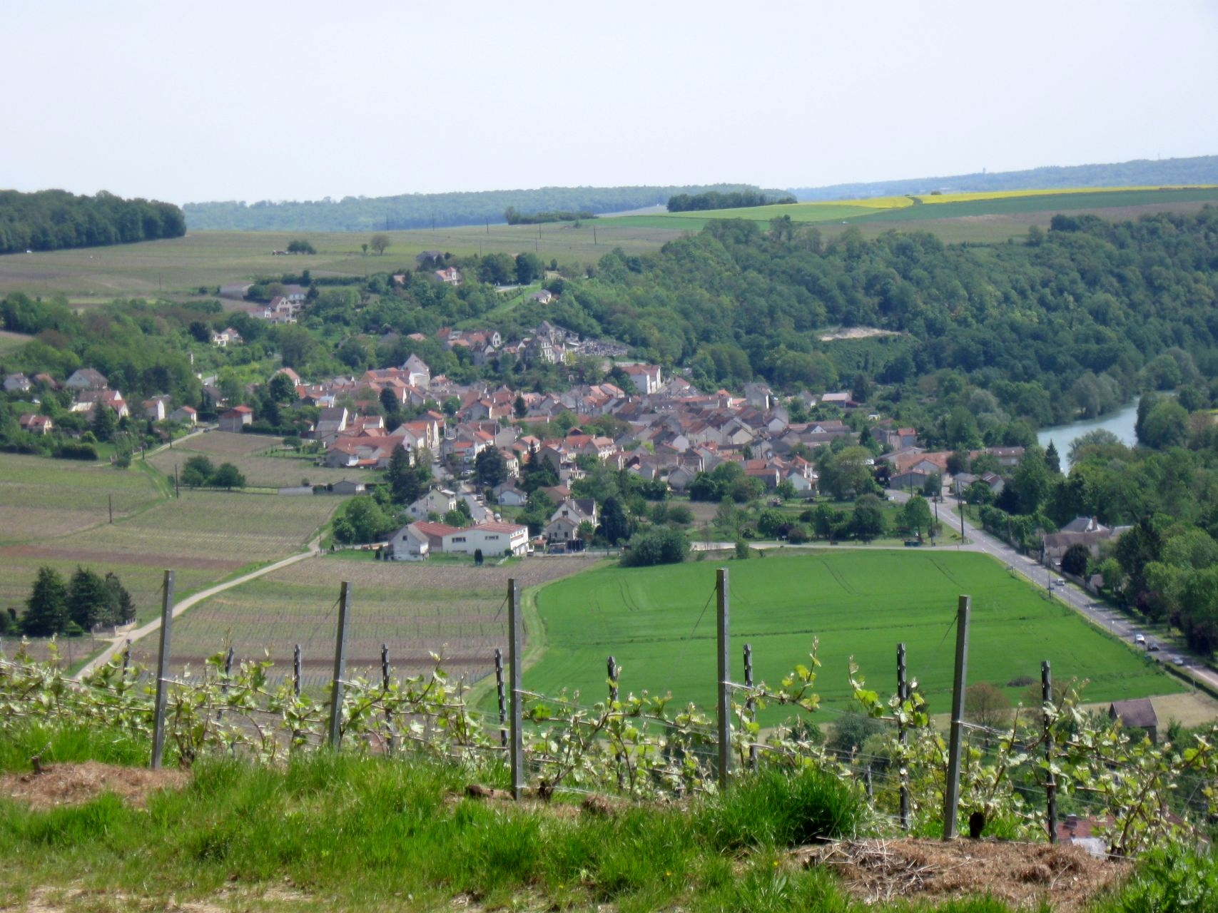 Le village de Crouttes-sur-Marne (Aisne , région Picardie)